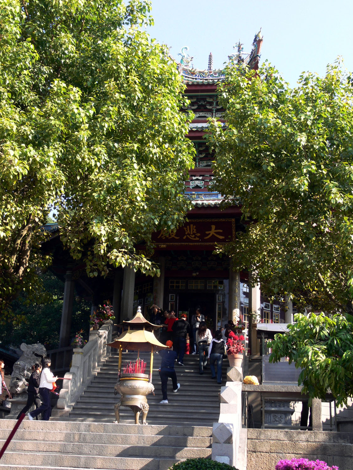 Da Bei Hall, Nanputuo temple, Xiamen厦门南普陀寺大悲殿